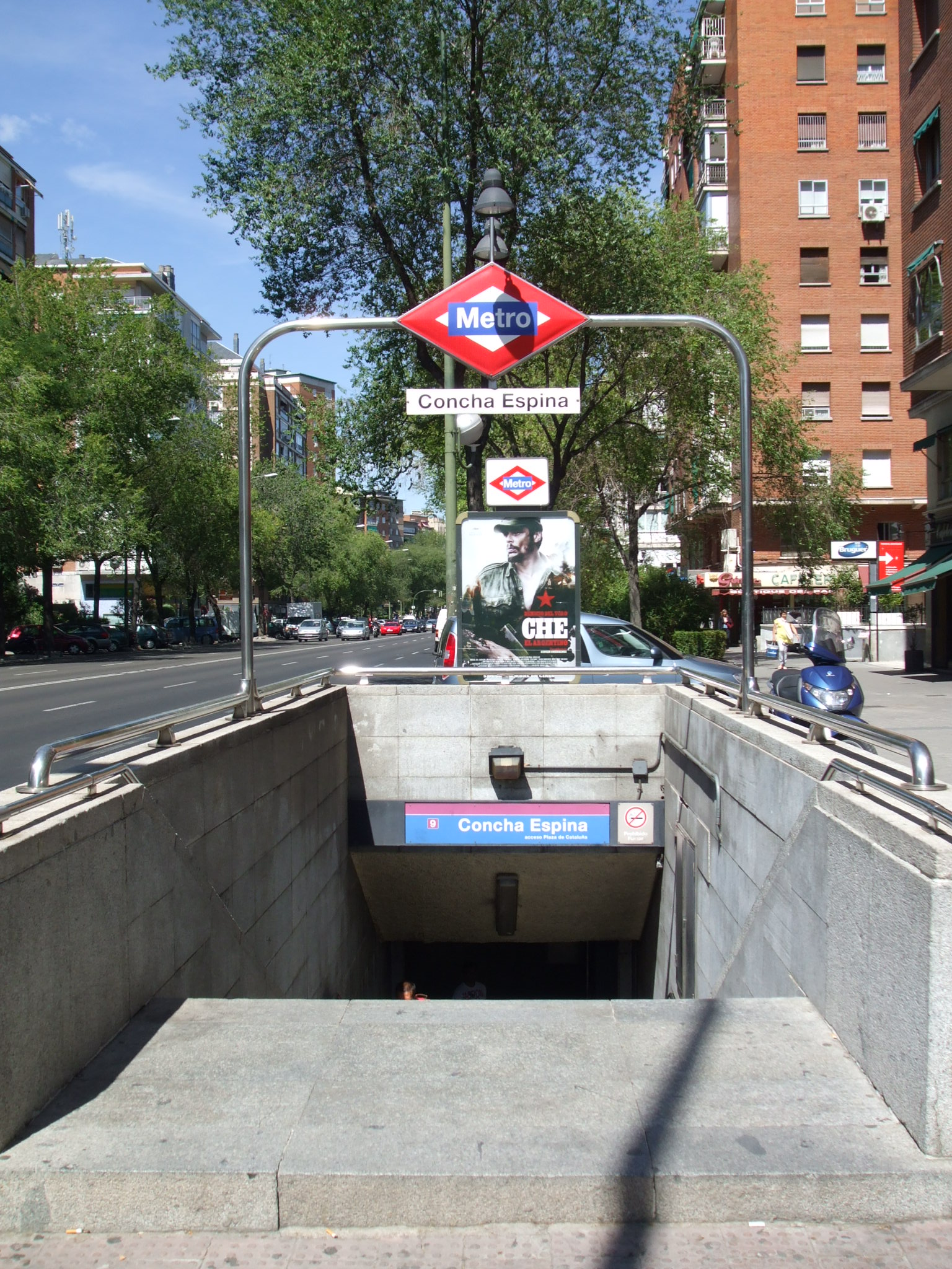 Estación de Concha Espina, boca de la Plaza de Cataluña